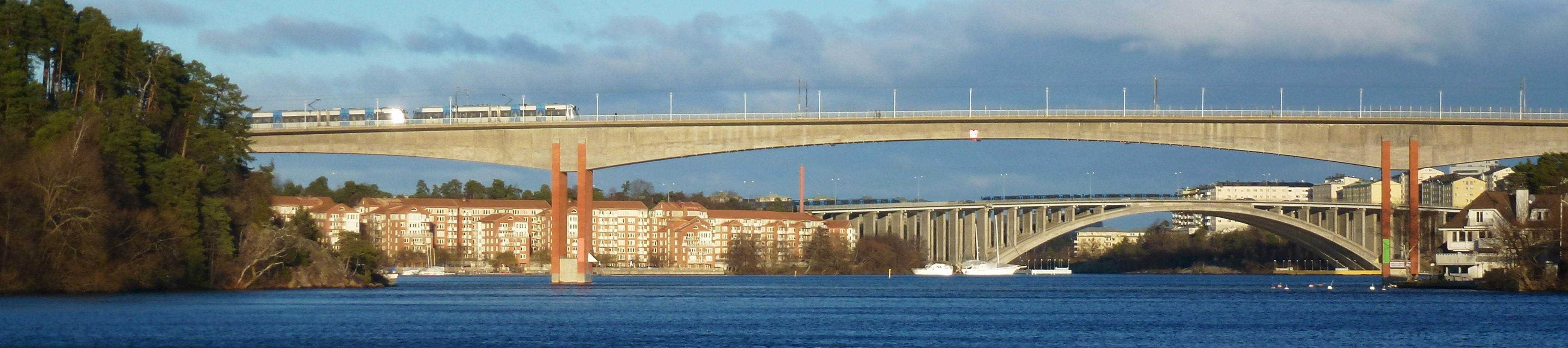 Alviksbron